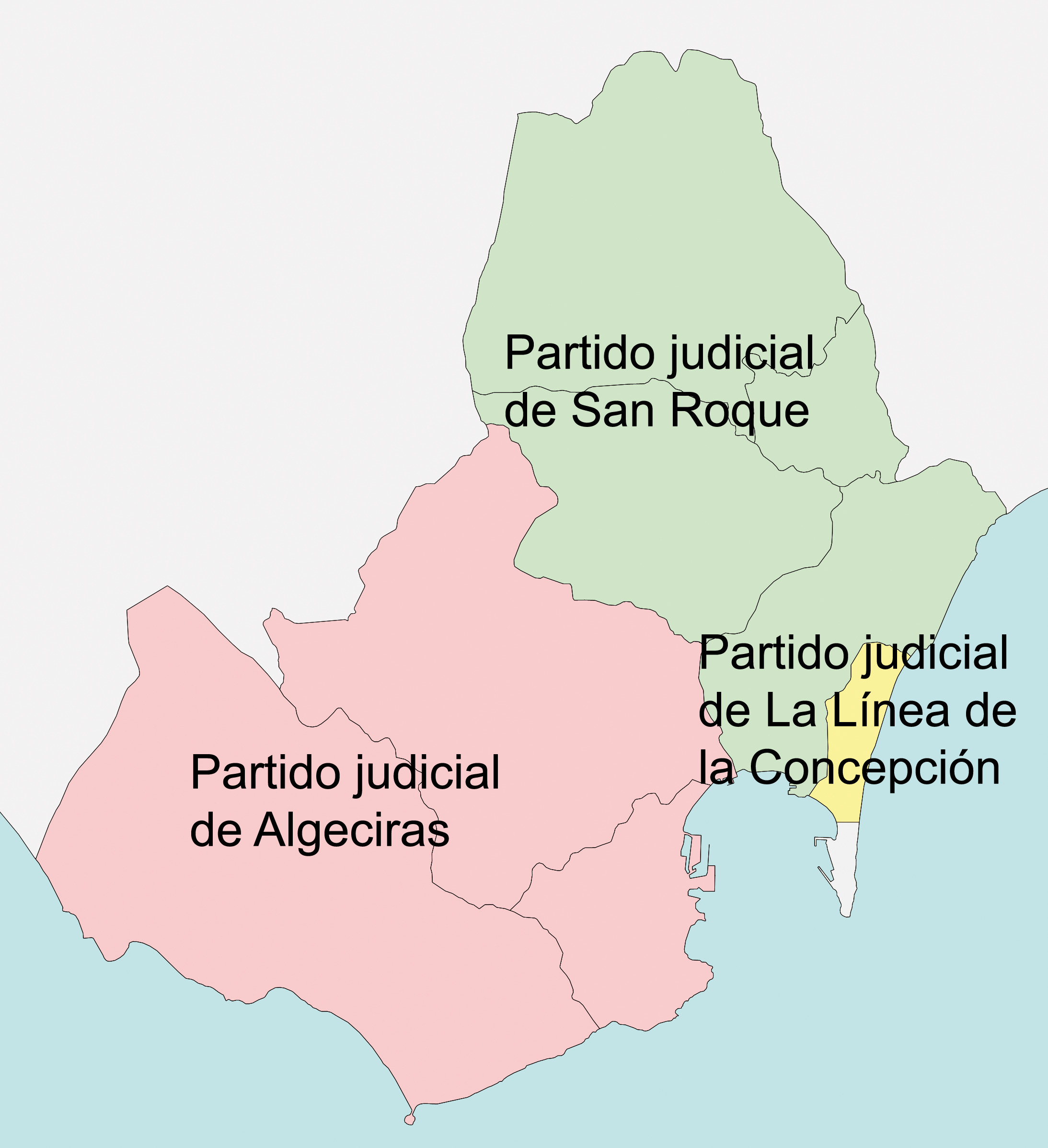 Mapa indicativo de los partido judiciales del Campo de Gibraltar, Andalucía, España